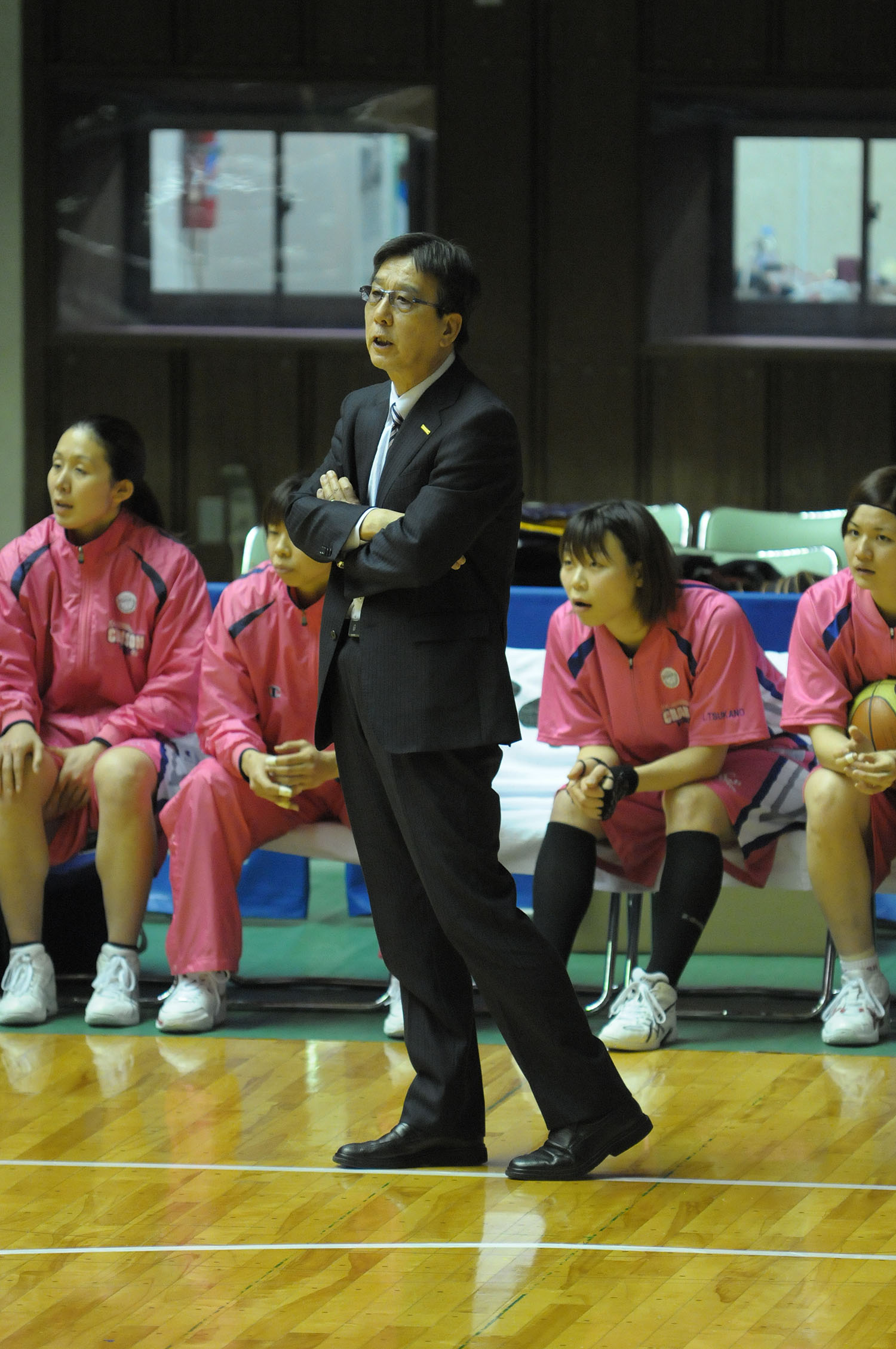 デンソーアイリス、木村功ヘッドコーチ。東京体育館で。